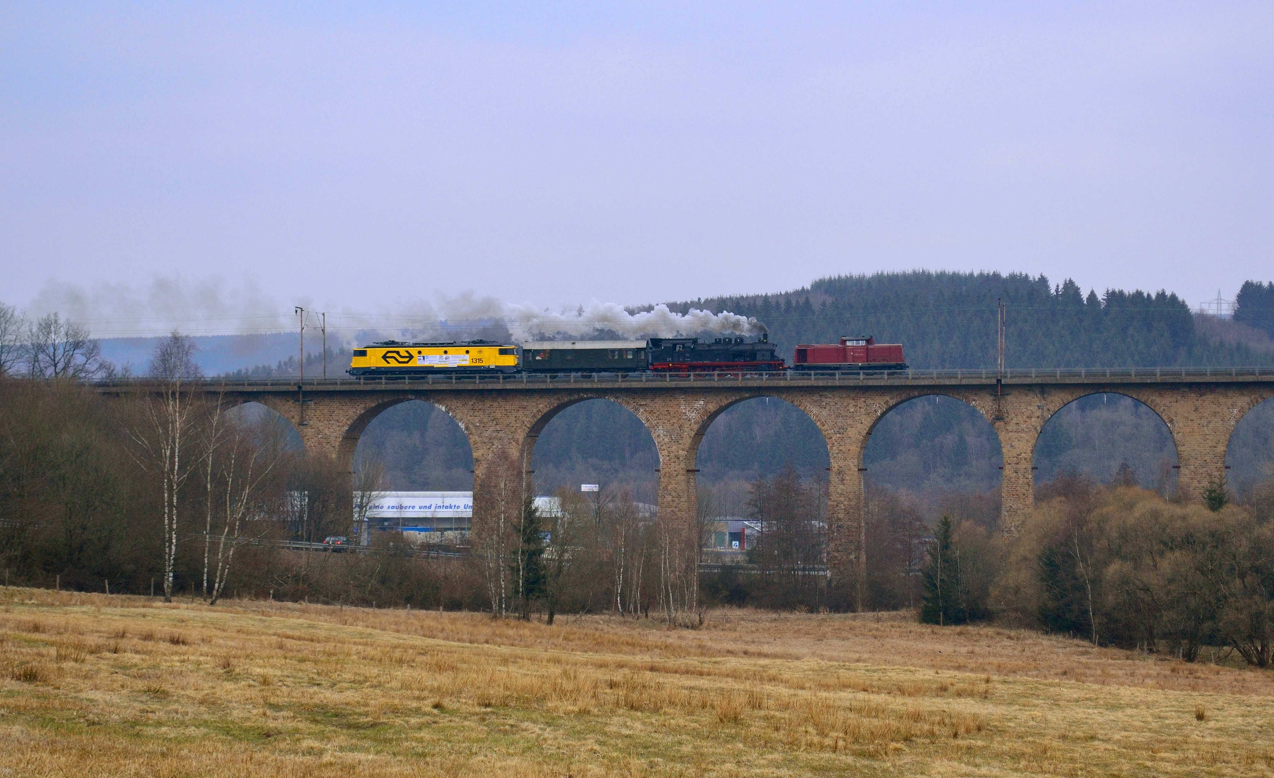 Die NeSa V100 2335 mit dem Überführungs-Lokzug DbZ 91999 auf dem Rudersdorfer Viadukt. Am Zugschluss läuft die niederländische E-Lok "NS 1315" kalt mit.